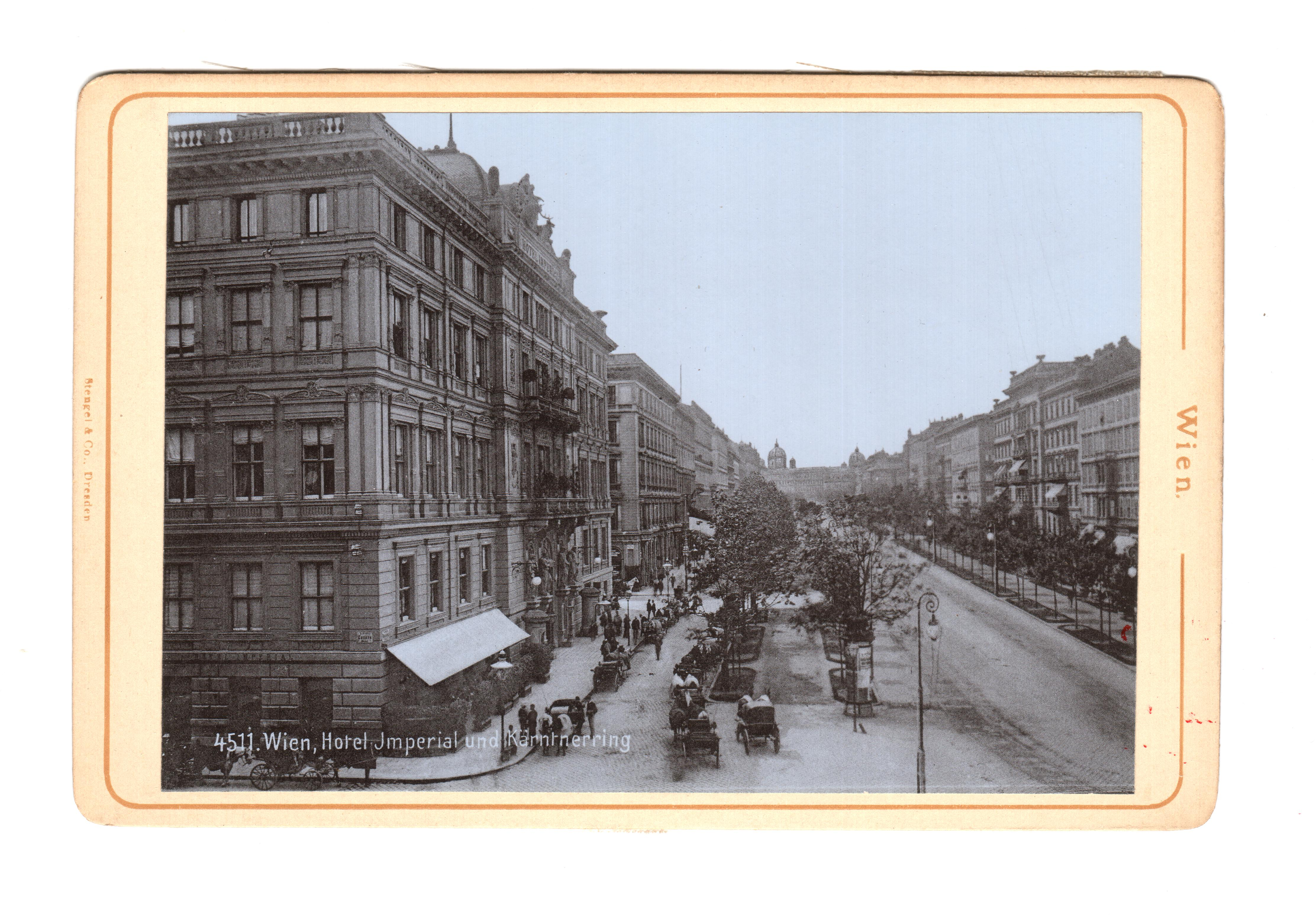 Osztrák-Magyar Monarchia, Bécs. Ismeretlen fényképész. Fényképalbum 16 fényképéből. A fényképek mérete 9,5 cm x 14,5 cm. ©© Megjelent Creative Commons alatt a Metapolisz sorozatban. A Metapolisz sorozat valamennyi képe és filmje Creative Commons alatti valamint kereskedelmi - for profit - célra is felhasználható. Ajánlott hivatkozás: Derzsi Elekes Andor: Metapolisz DVD line ©© Published under Creative Commons in the Metapolisz DVD line. All of the photos and vids in the Metapolisz DVD line are under Creative Commons and can be used even for commercial – for profit – purposes. Recommended Citation Derzsi Elekes Andor: Metapolisz DVD line